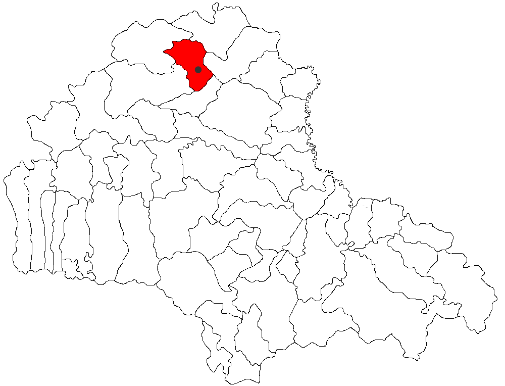 Categorie:Hărţi ale judeţului Braşov